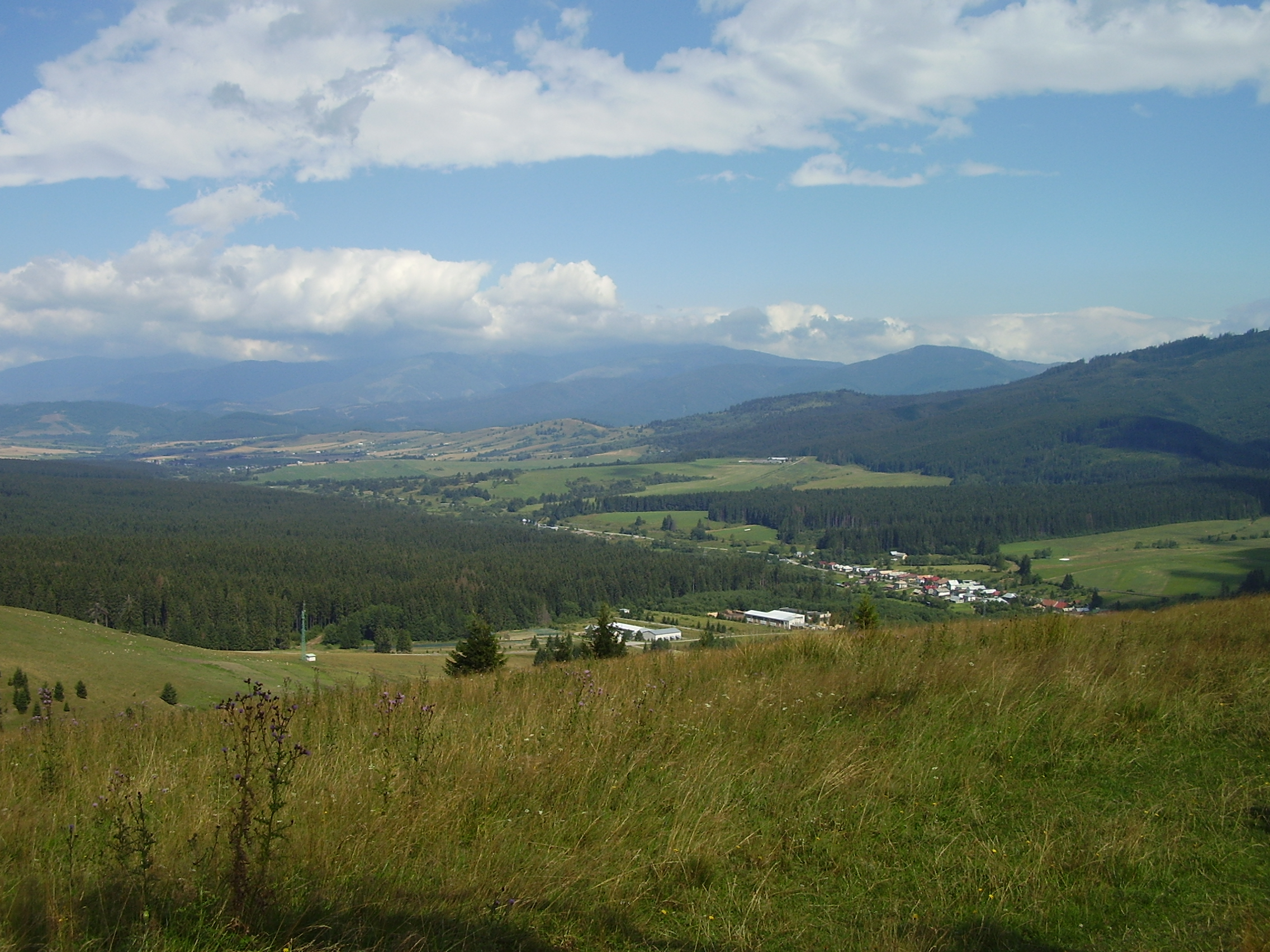 Muránska planina, okres Brezno, Slovakia